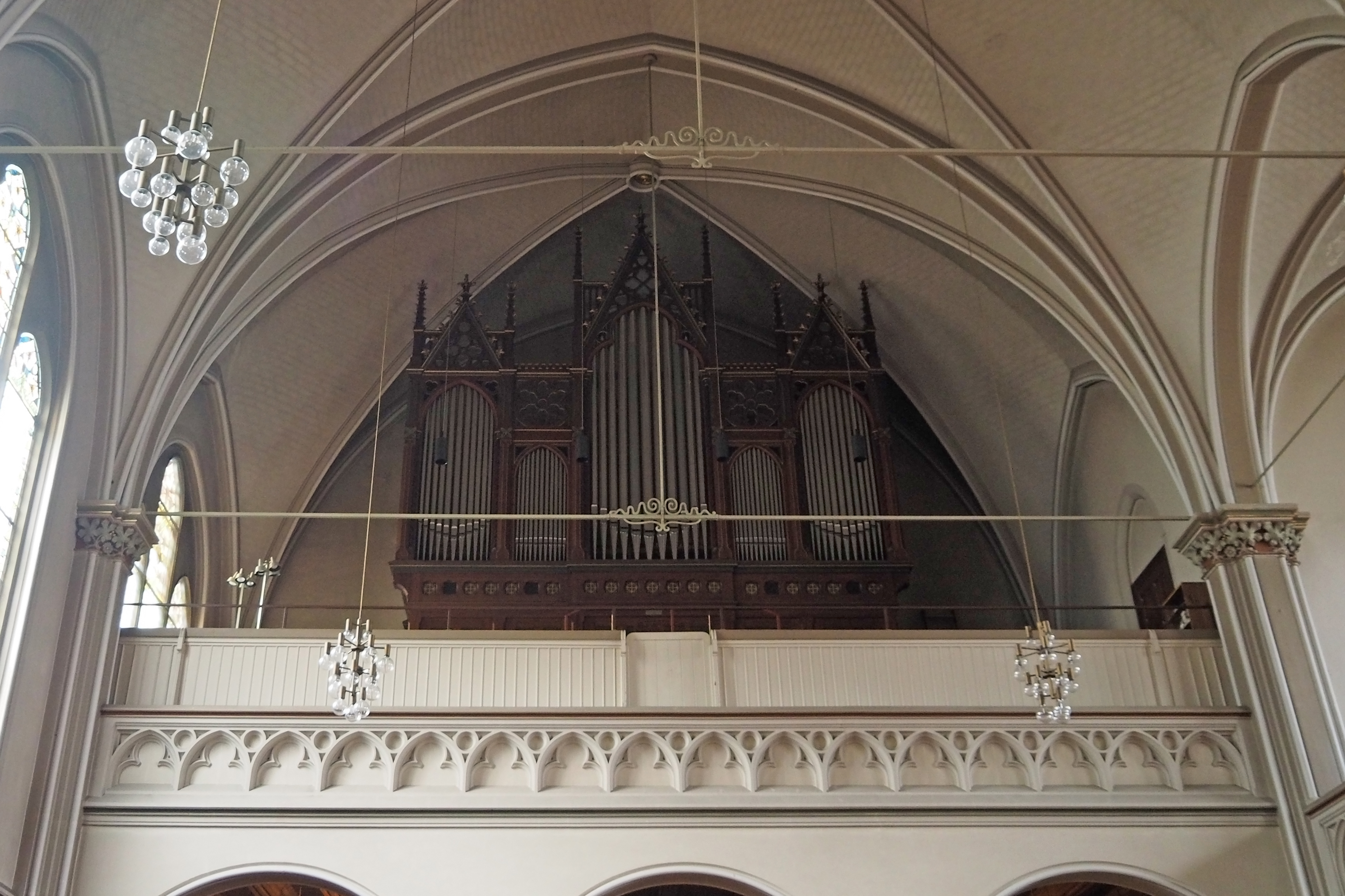 Sauerorgel von 1903 in der Lutherkirche Bad Harzburg